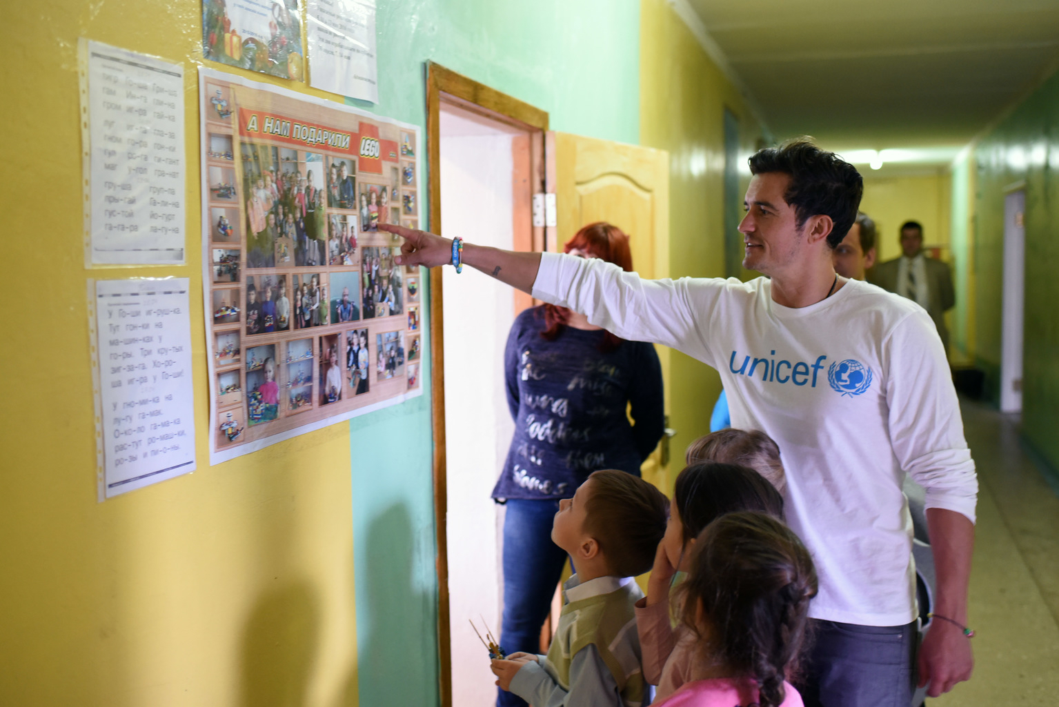 ©UNICEF/UN017934/Georgiev “Education is providing children in eastern Ukraine with the building blocks to rebuild their lives in a safe and supportive environment,” said Bloom. UNICEF so far has supported the repair and rehabilitation of 57 schools in eastern Ukraine and has supplied hundreds of thousands of children on all sides of the conflict with vital supplies like schoolbooks, desks and pencils, as well as psychological support.